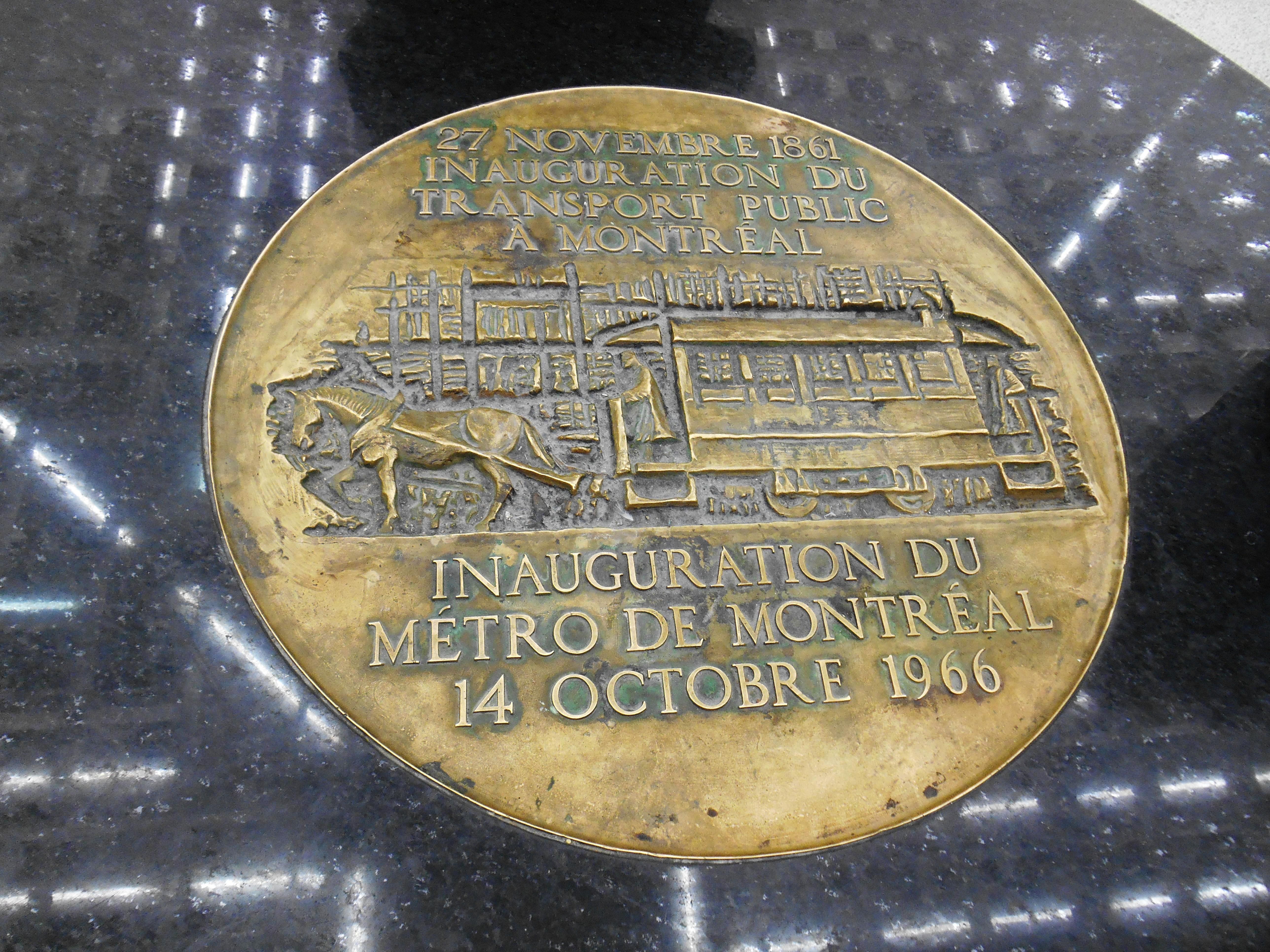 Plaque commémorative, 1966, par Robert Lapalme et Georges Lauda, mezzanine de la station de métro Berri-UQAM, Montréal « Ce disque de bronze souligne la continuité entre le premier système de transport en commun à Montréal en 1861 (les tramways à traction hippomobile) et le métro, ouvert le 14 octobre 1966. Il fut dévoilé lors des cérémonies d'ouverture du métro. »